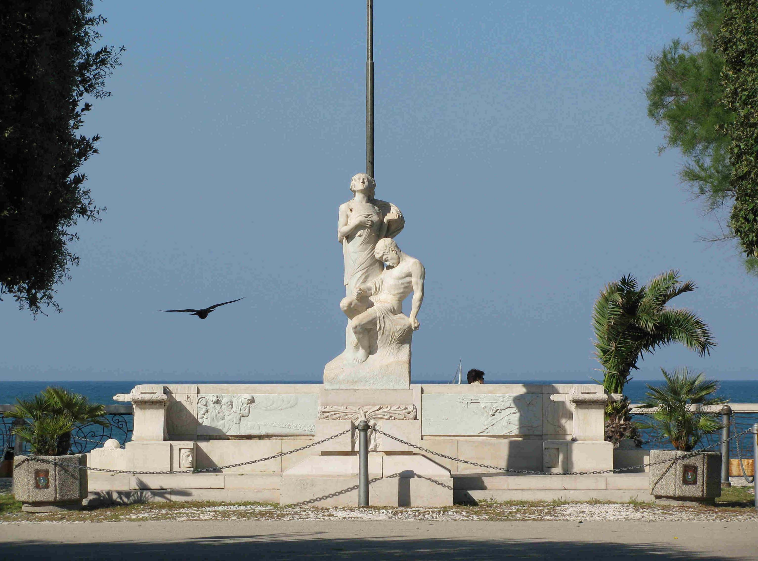 Villa Comunale di Trani - Monumento ai Caduti